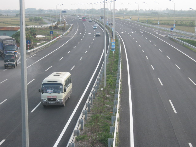 Một góc Đoạn đường cao tốc Cầu Giẽ - Ninh Bình thuộc tuyến Đường cao tốc Bắc - Nam